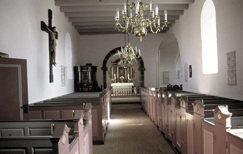 Rybjerg Kirke, (Skive Kommune), Kirkerummet set mod øst